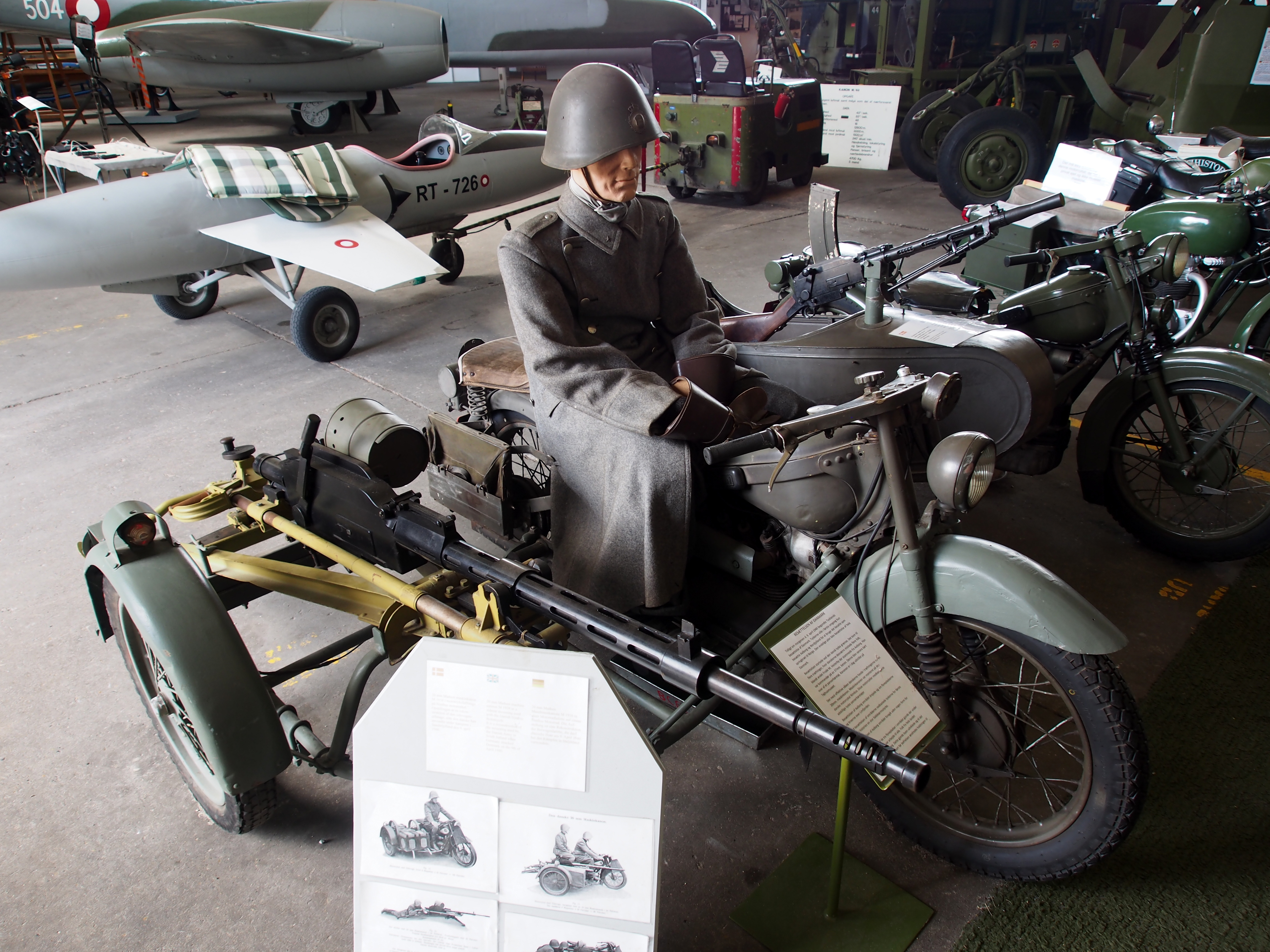 Photographed at Aalborg, Denmark.